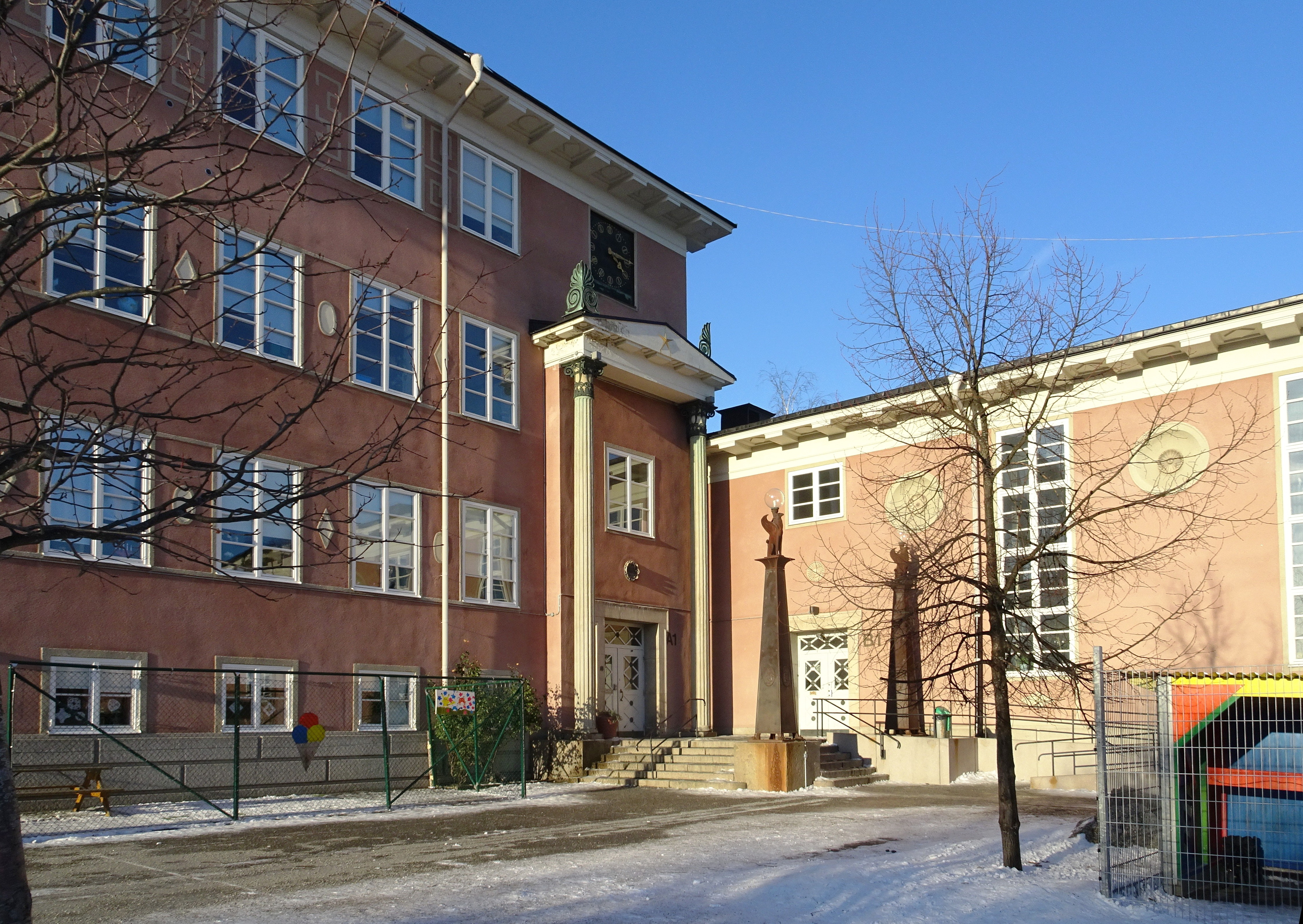 Sverigefinska skolan i Stockholm (före detta Fridhemsplans gymnasium, ursprungligen Norra kommunala mellanskolan), arkitekt Georg A. Nilsson